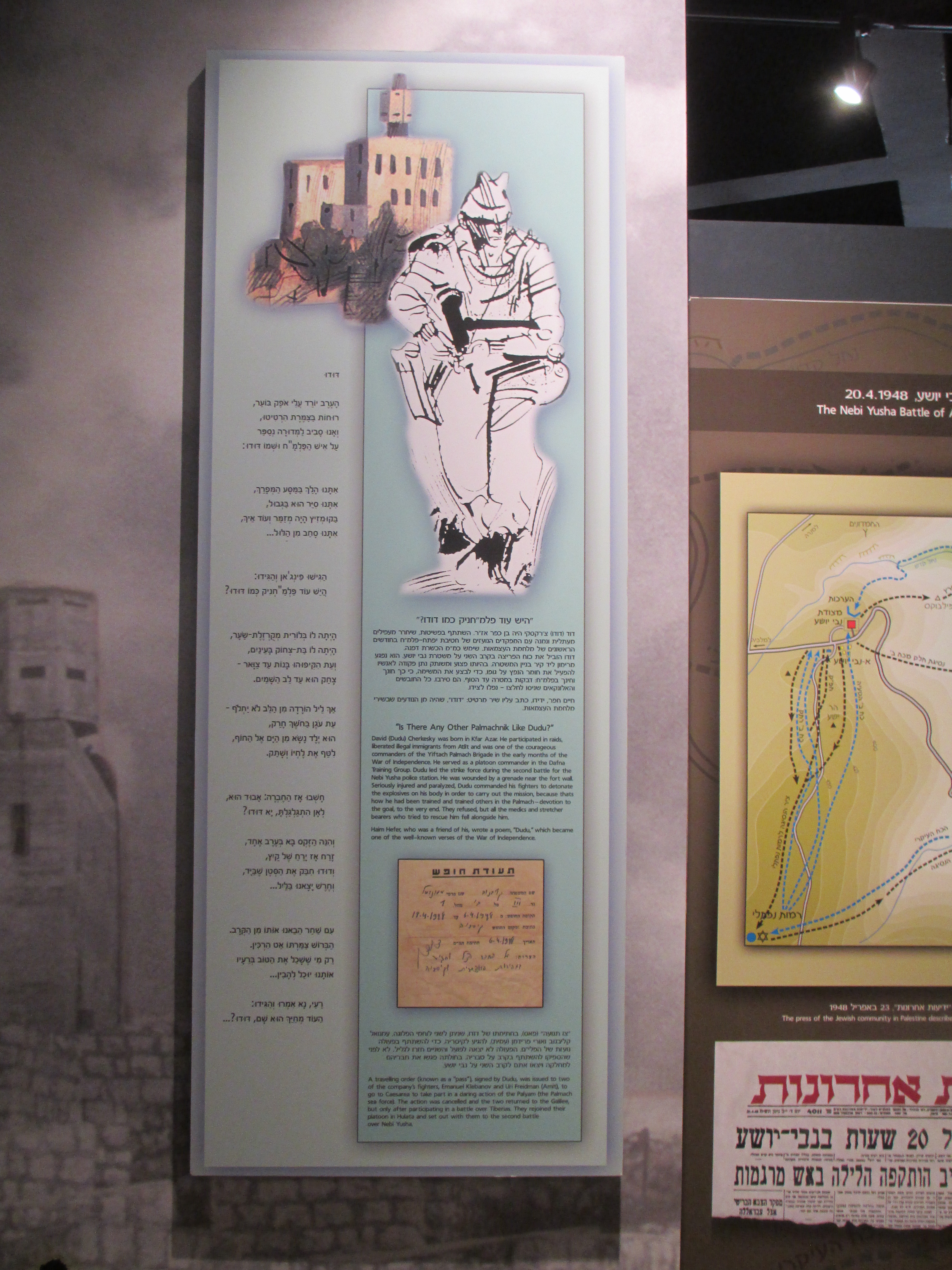 השיר "דודו" במוזיאון הרעות